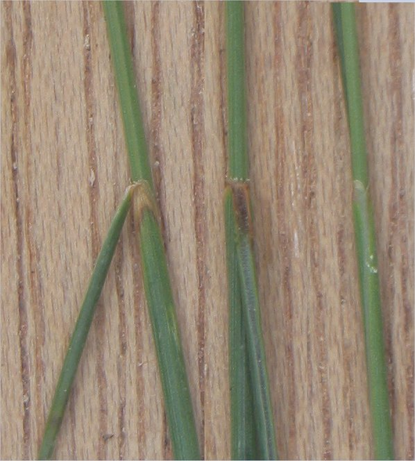 (nl: Ruig schapengras tongetje) Festuca ovina subsp. hirtula ligula